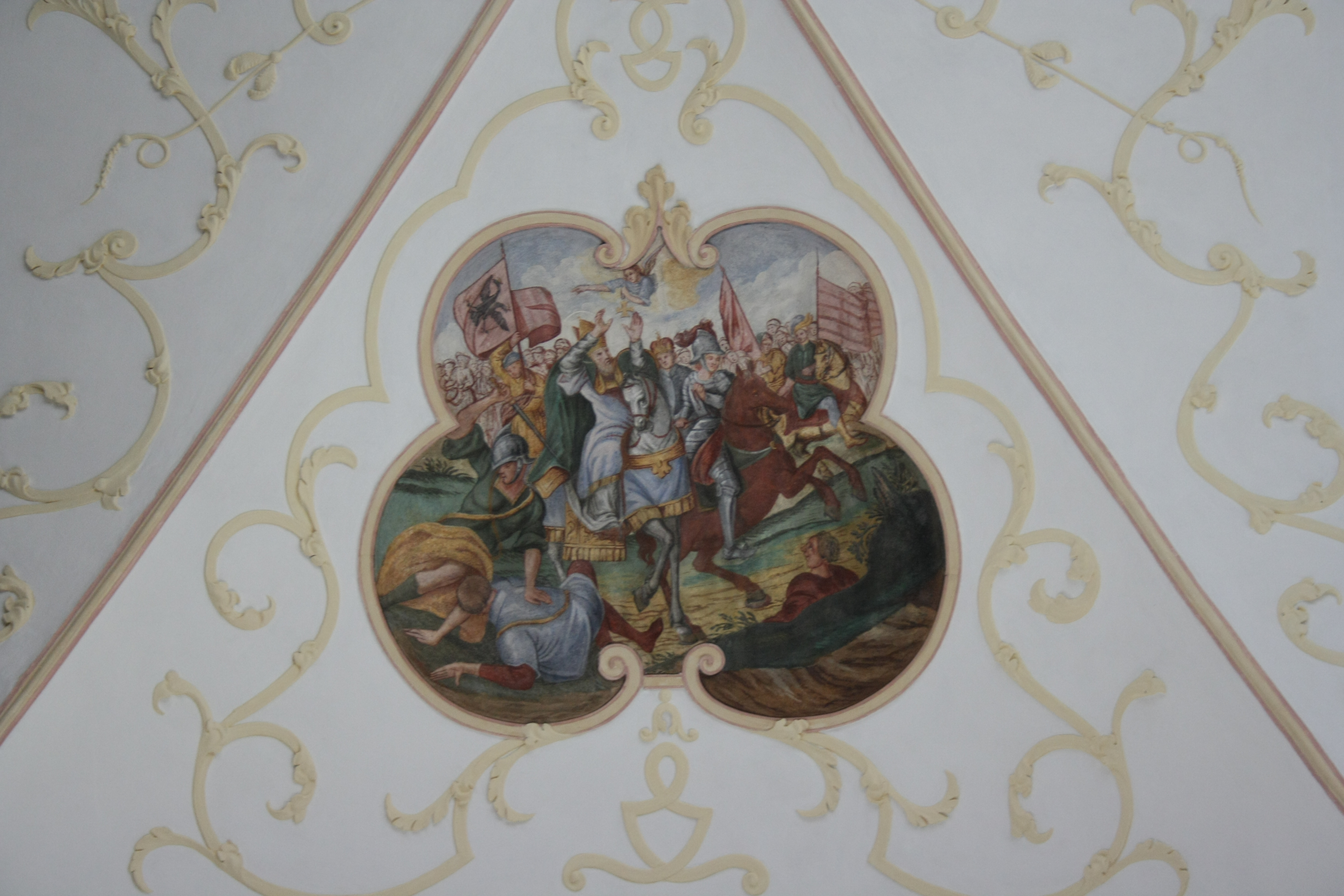 Katholische Pfarrkirche St. Ulrich und Johannes Baptist in Schwenningen im Landkreis Dillingen an der Donau (Bayern), Deckenfresko im Langhaus mit Darstellung des hl. Ulrich und der Schlacht auf dem Lechfeld